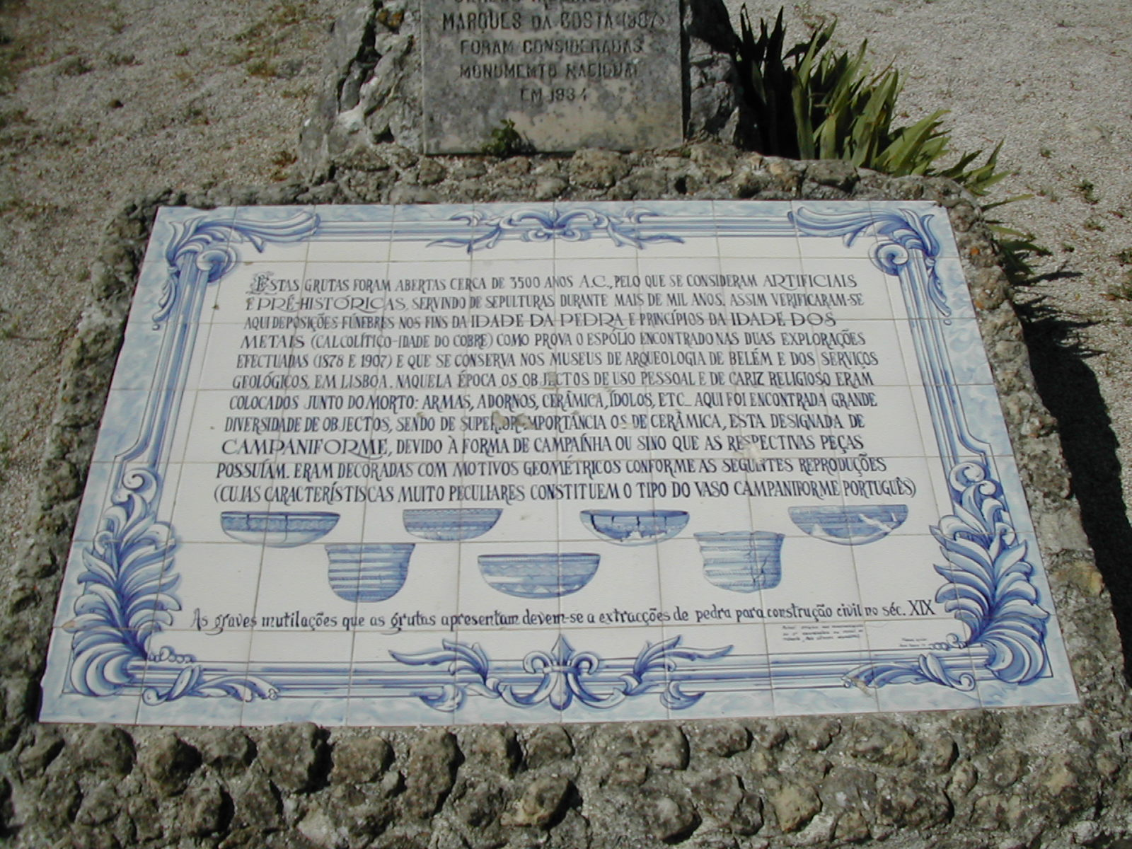 Painel de azulejos. Grutas da Quinta do Anjo. Palmela. Portugal